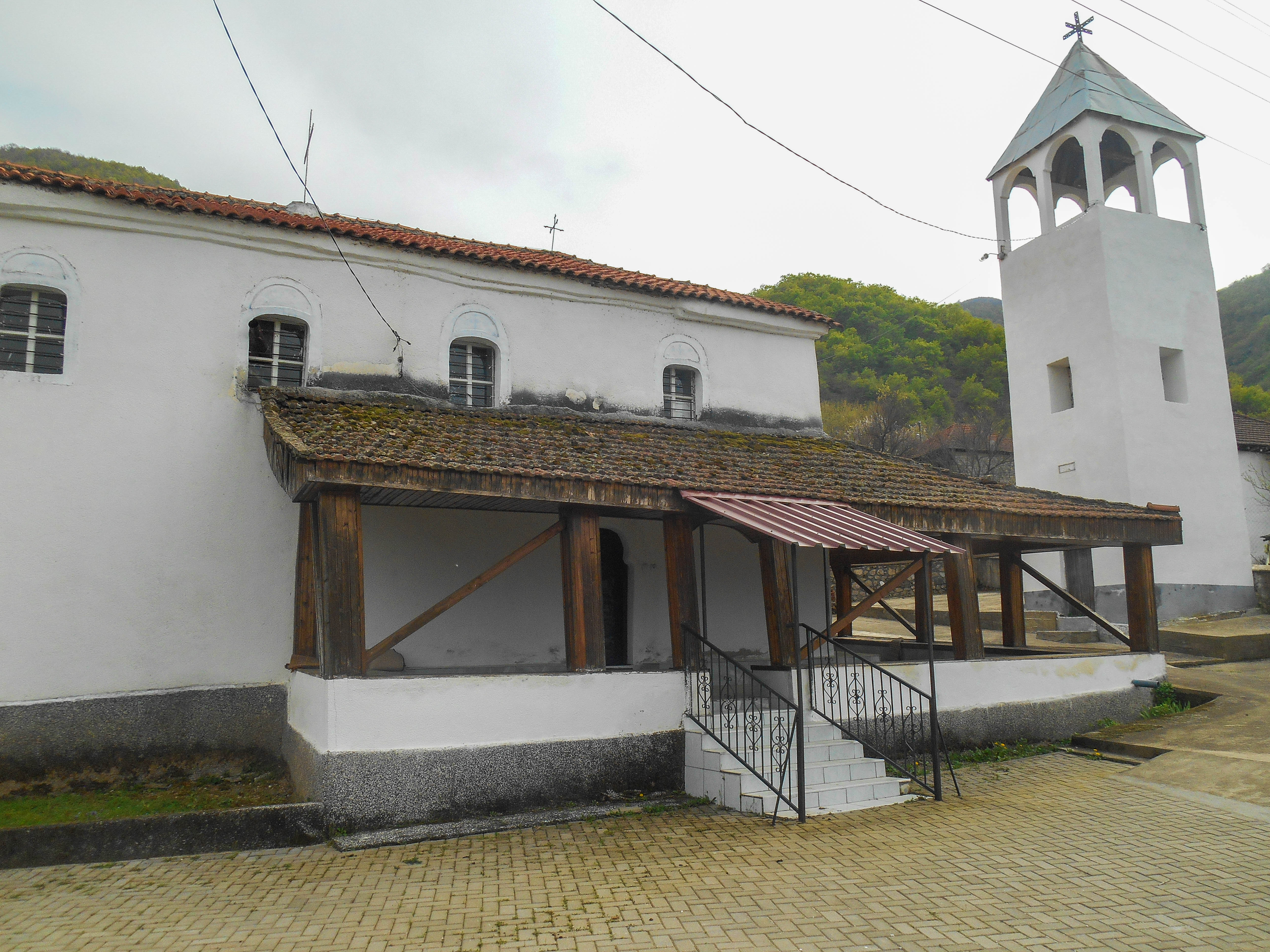 Црквата Свети Илија